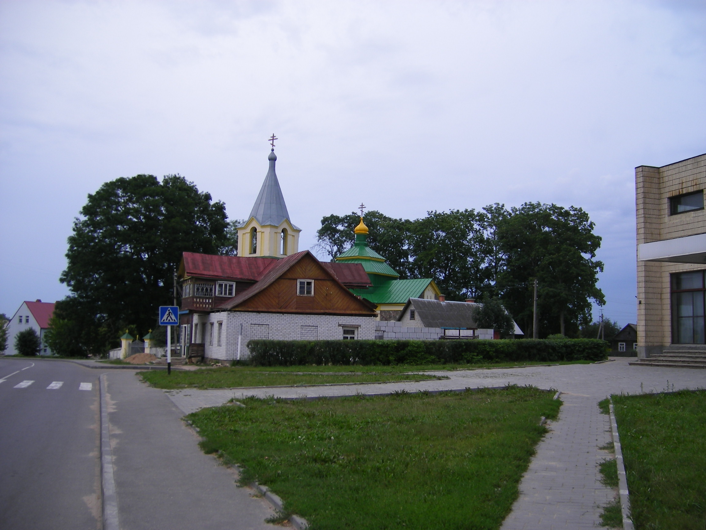 Astryna, Spaso-Preobrazhenskaya church